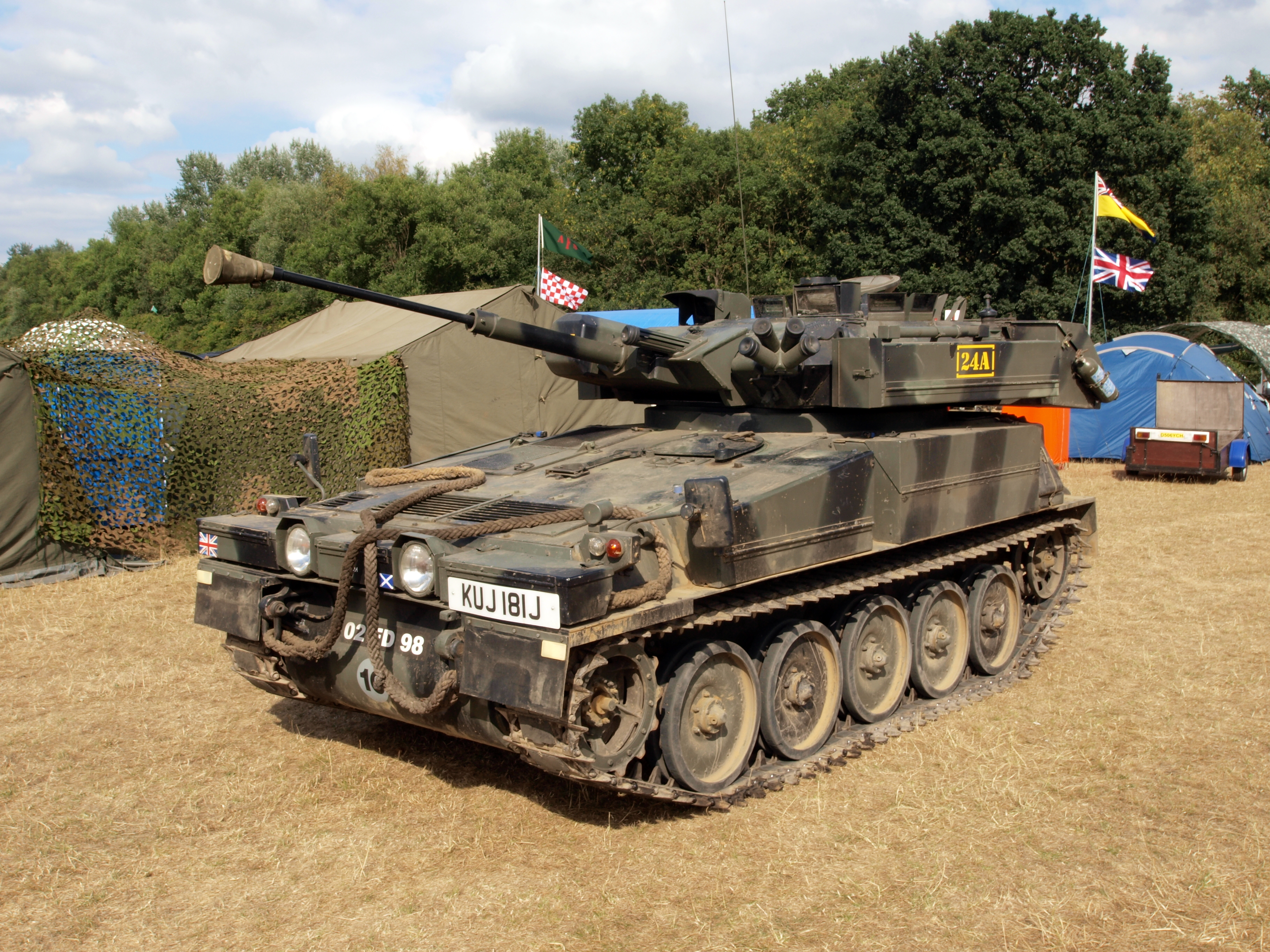 FV107 Scimitar